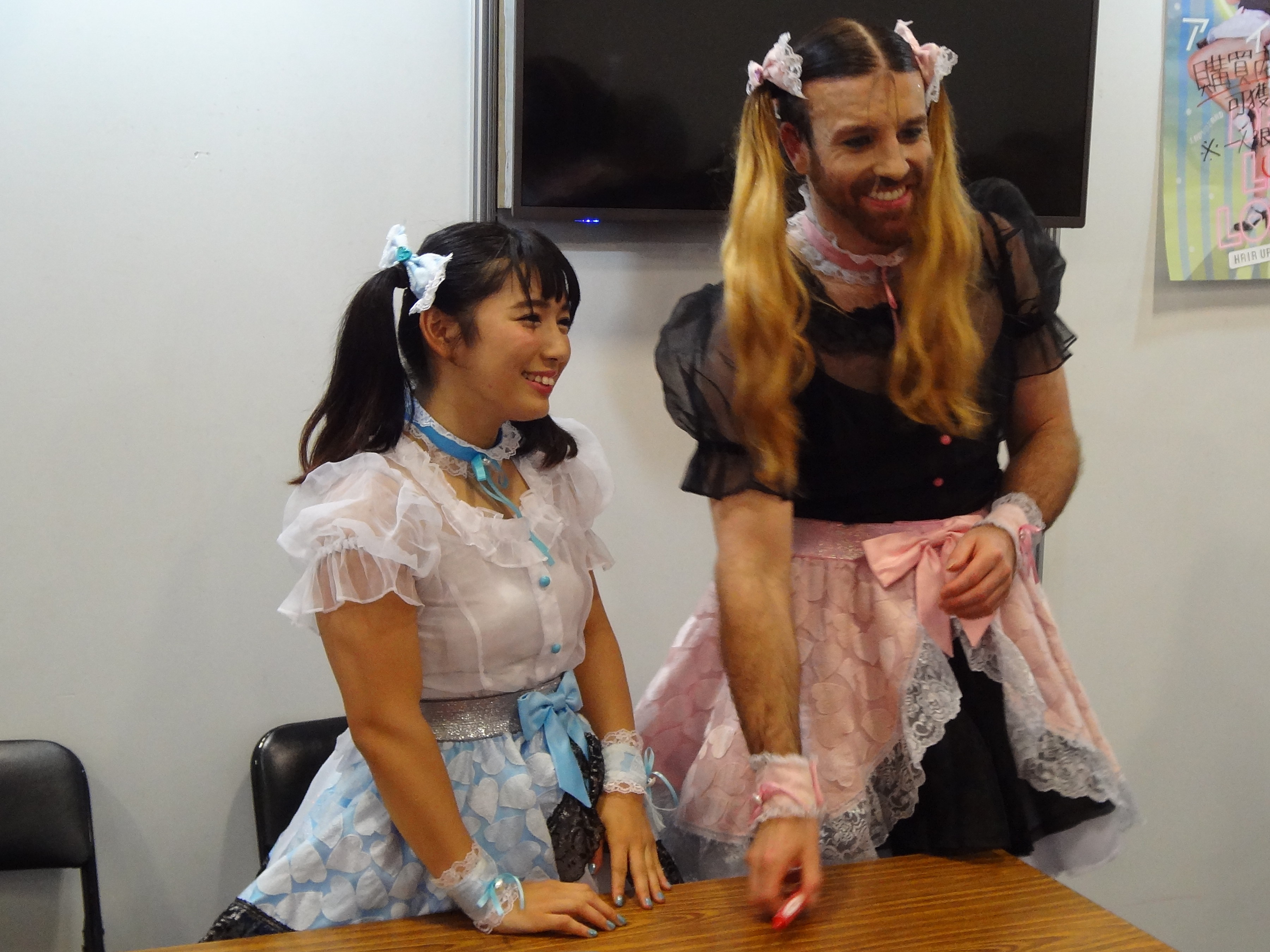 2017年（第18屆）漫畫博覽會日本館，Deadlift Lolita會場限定商品簽名會。左起：才木玲佳、Ladybeard。